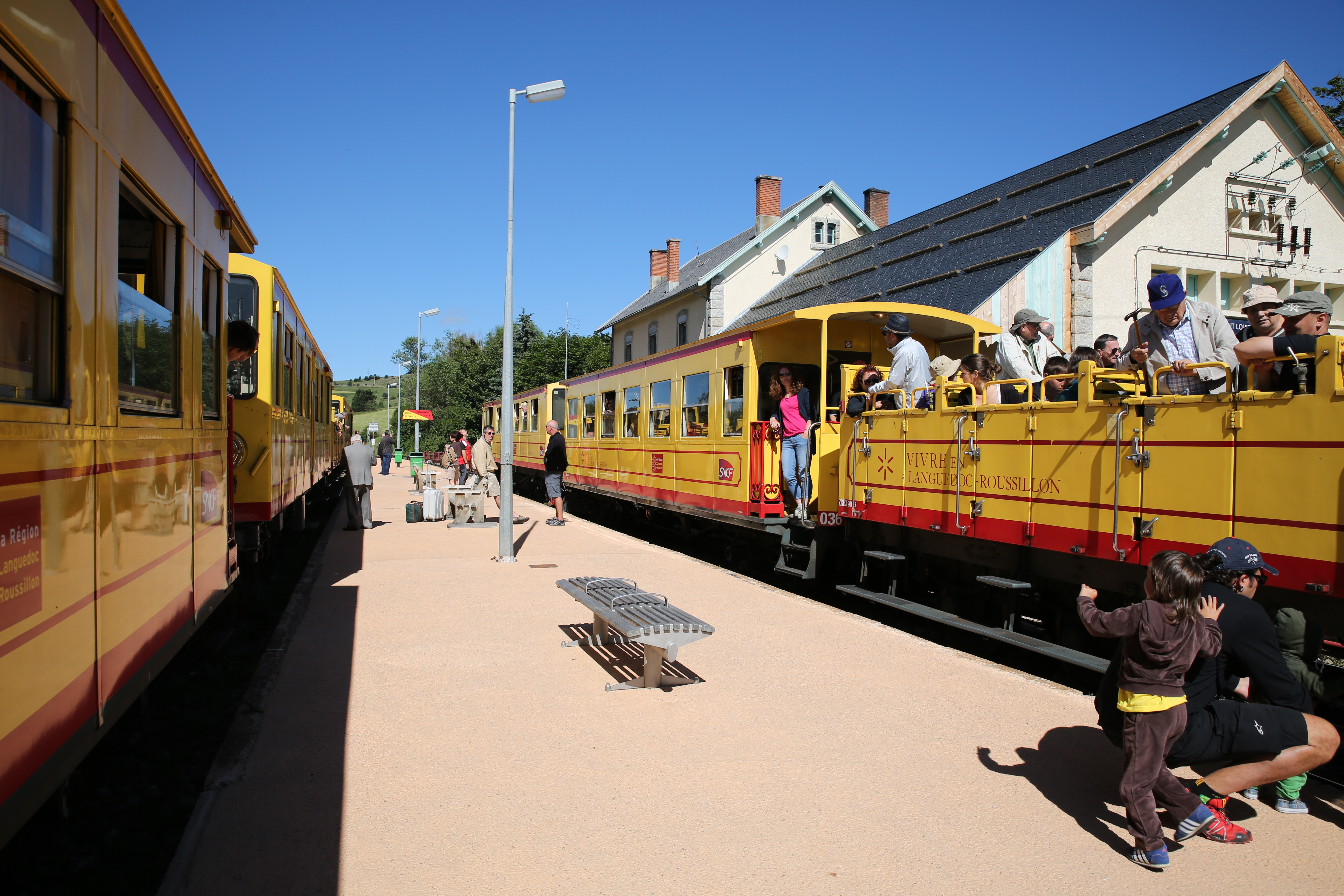 Croisement de train jaune à Font-Romeu